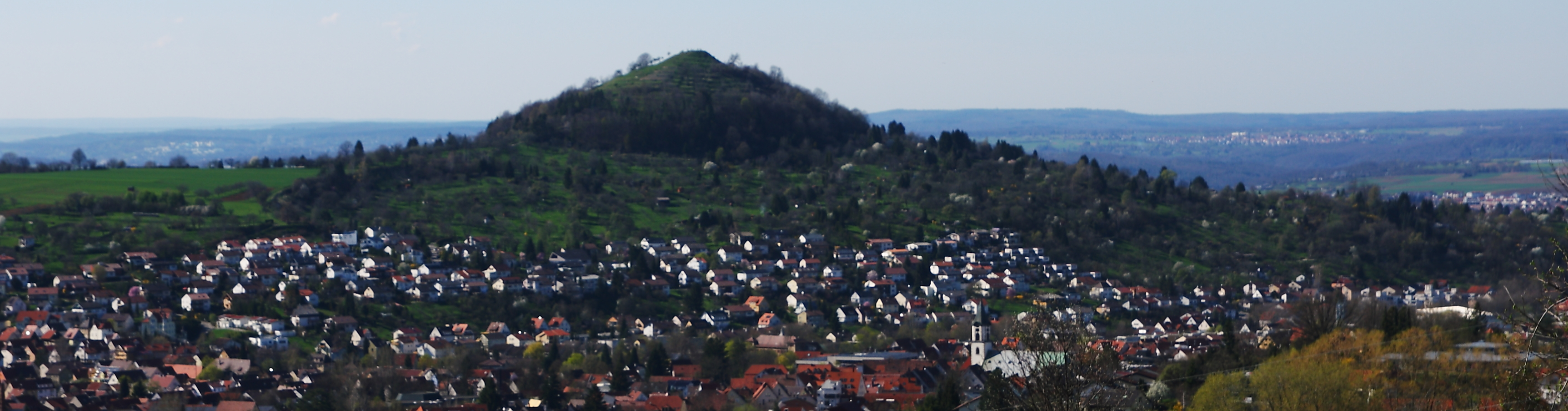 Georgenberg,Pfullingen